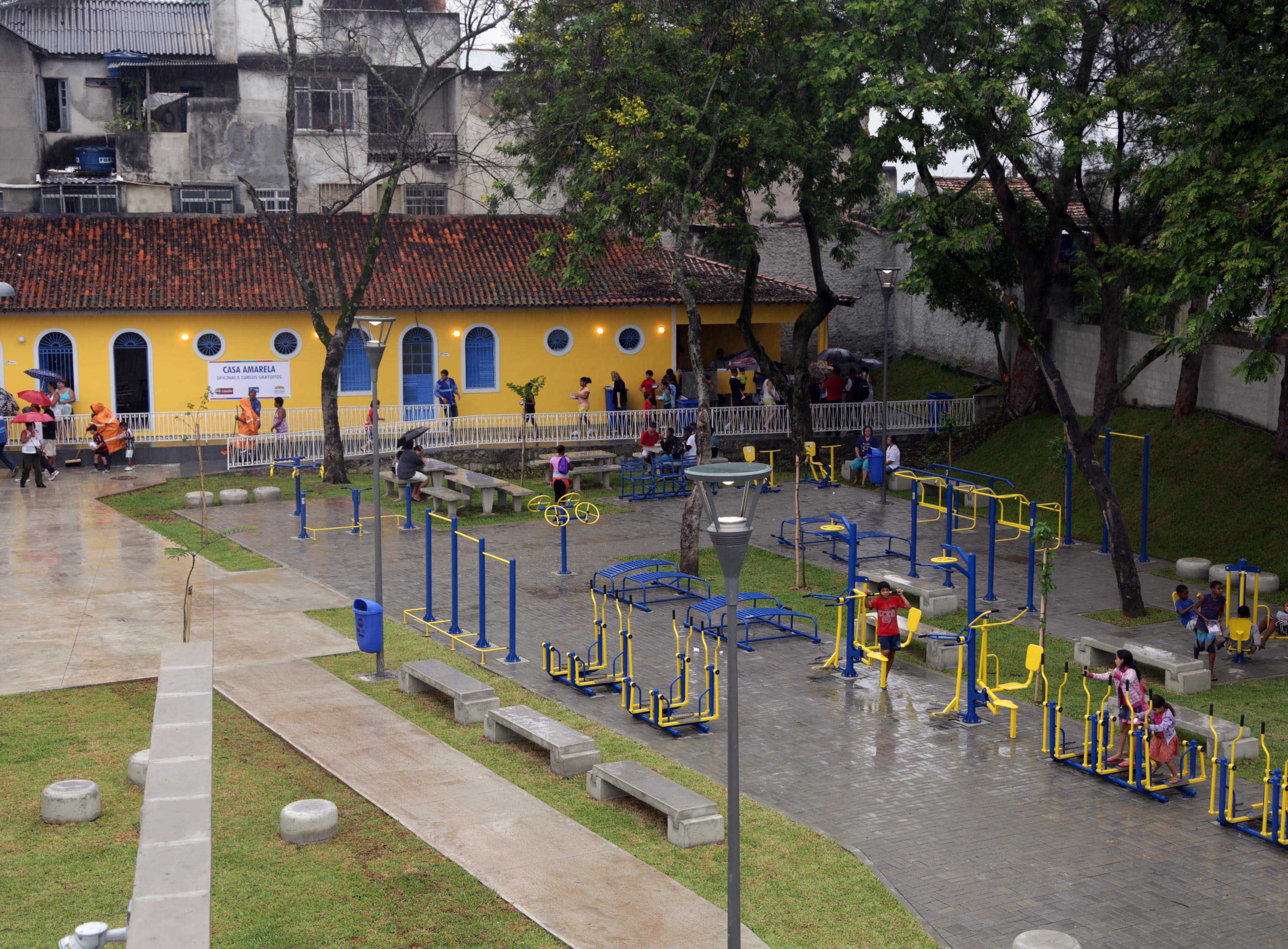 Vista do Parque Machado de Assis.